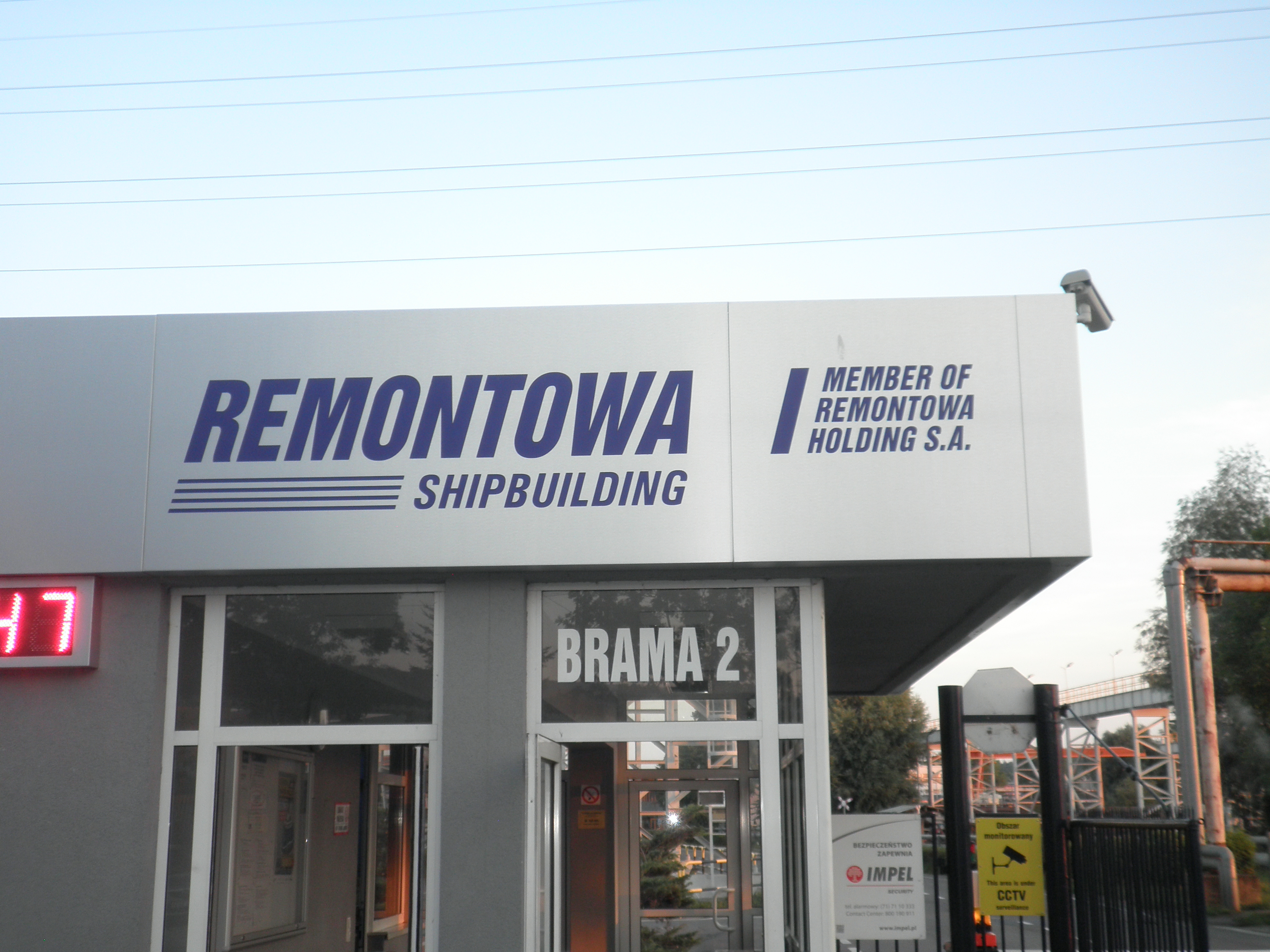 Remontowa Shipbuilding, ul. Swojska 8, 80-958 Gdańsk, Polen.